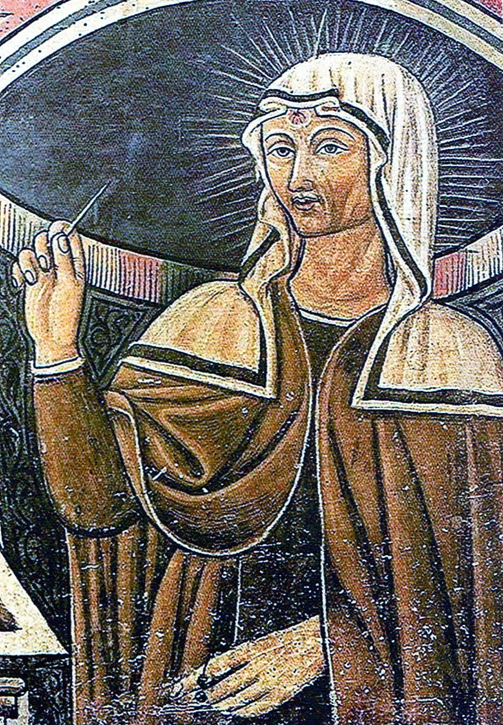 ritratto di Santa Rita, particolare della cassa che contenne il corpo, Santuario di Cascia